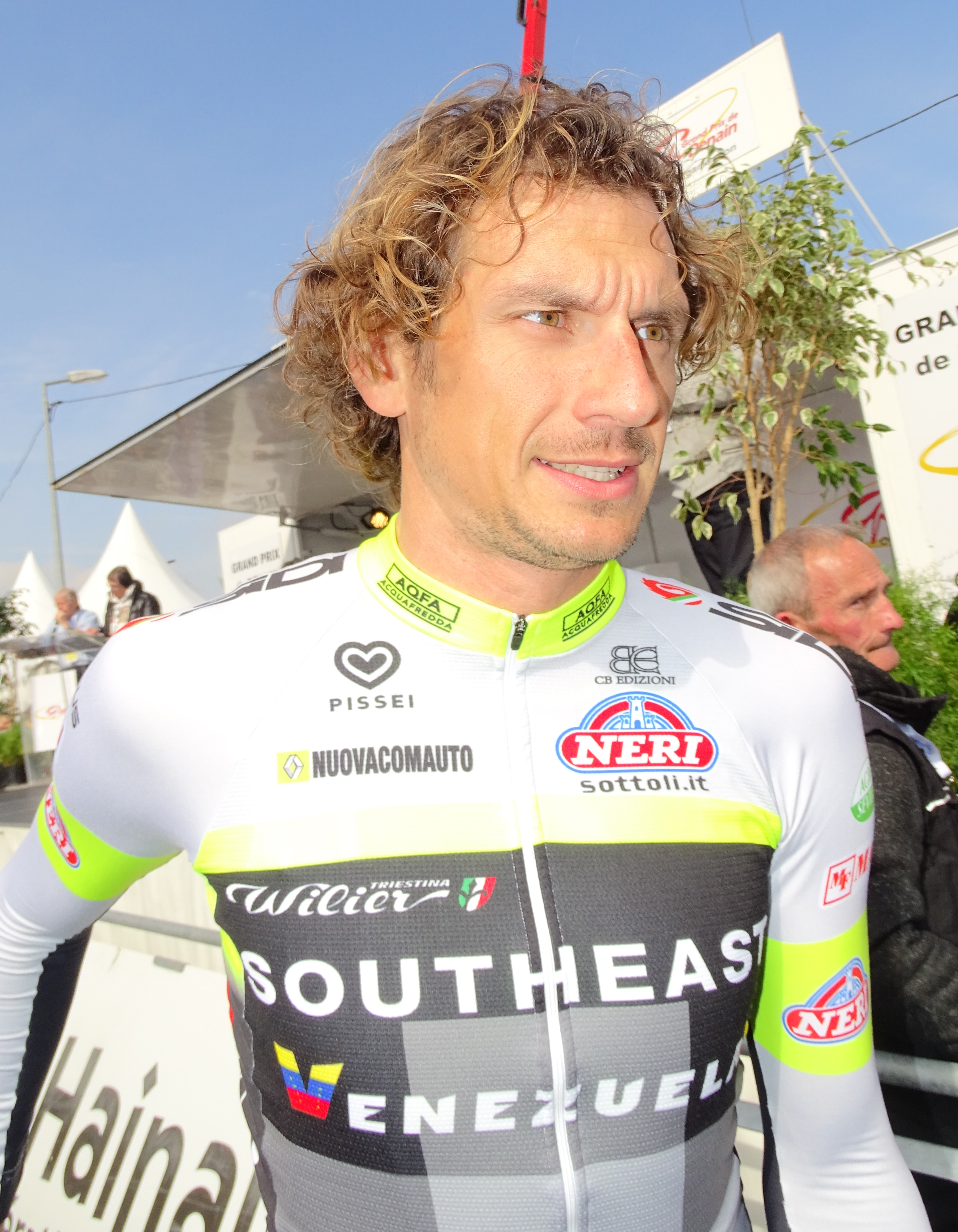 Reportage réalisé le jeudi 14 avril à l'occasion du départ et de l'arrivée du Grand Prix de Denain 2016 à Denain, Nord, Nord-Pas-de-Calais-Picardie, France.